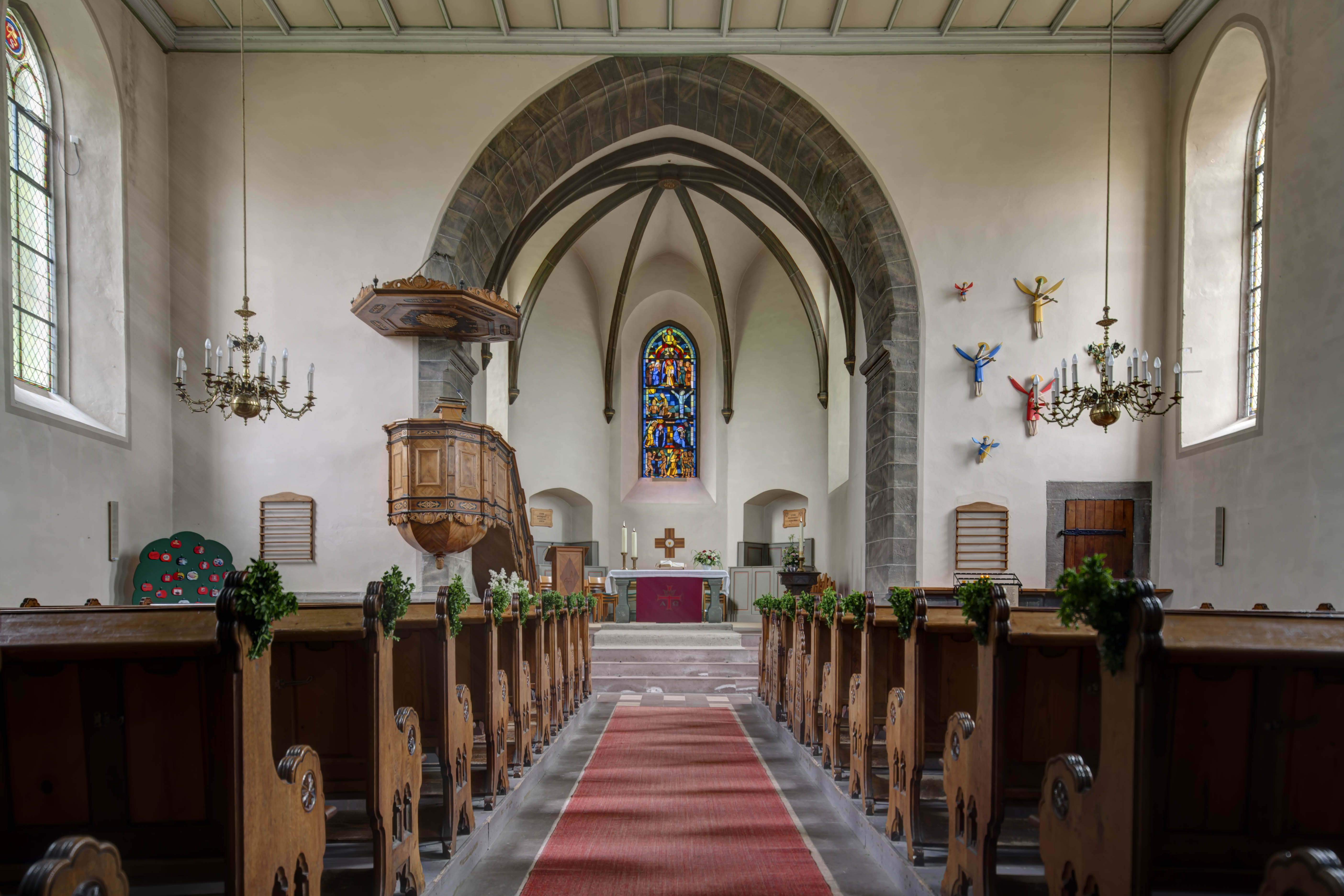 St. Marien Bad Sooden-Allendorf, Blick zum Chor